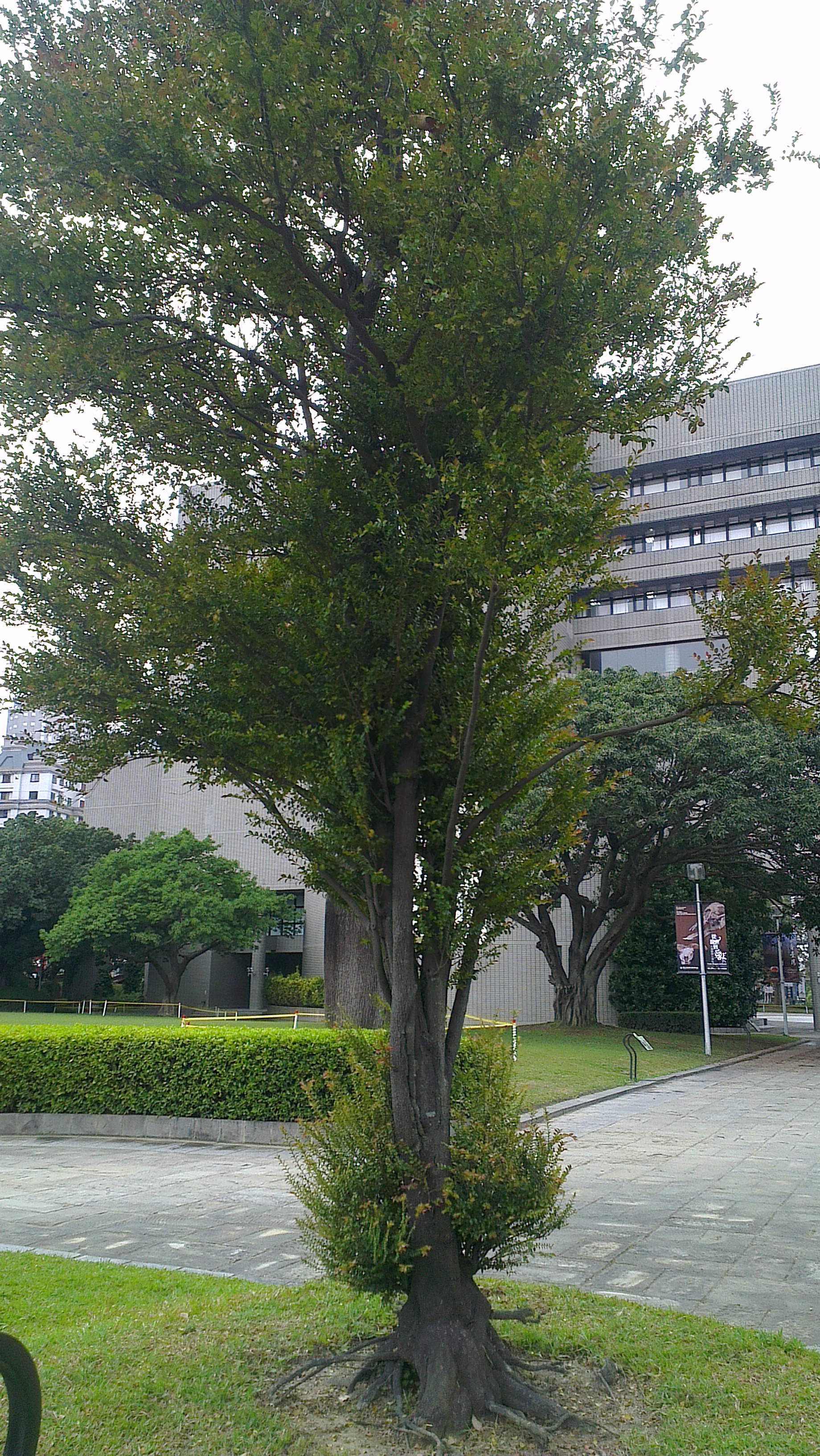 國立自然科學博物館，楓港柿。